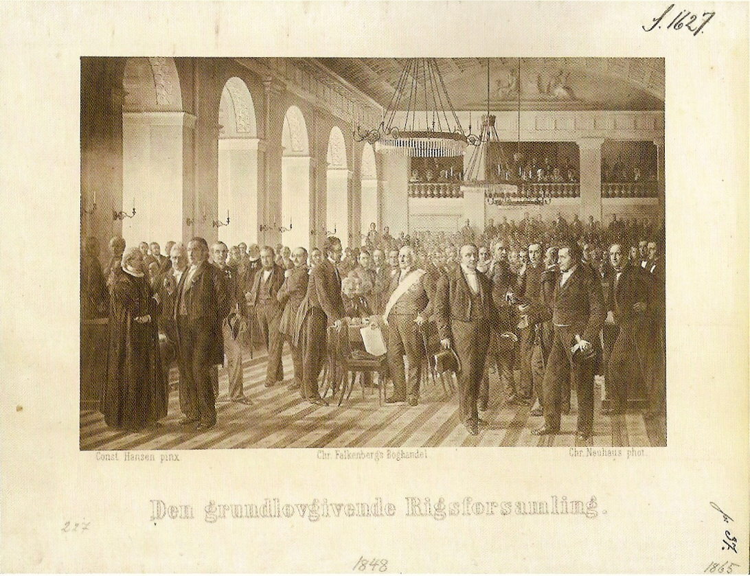 foto fra 1865 af Constantin Hansens maleri "Den Grundlovgivende Forsamling i 1848" af fotograf Christian Neuhaus